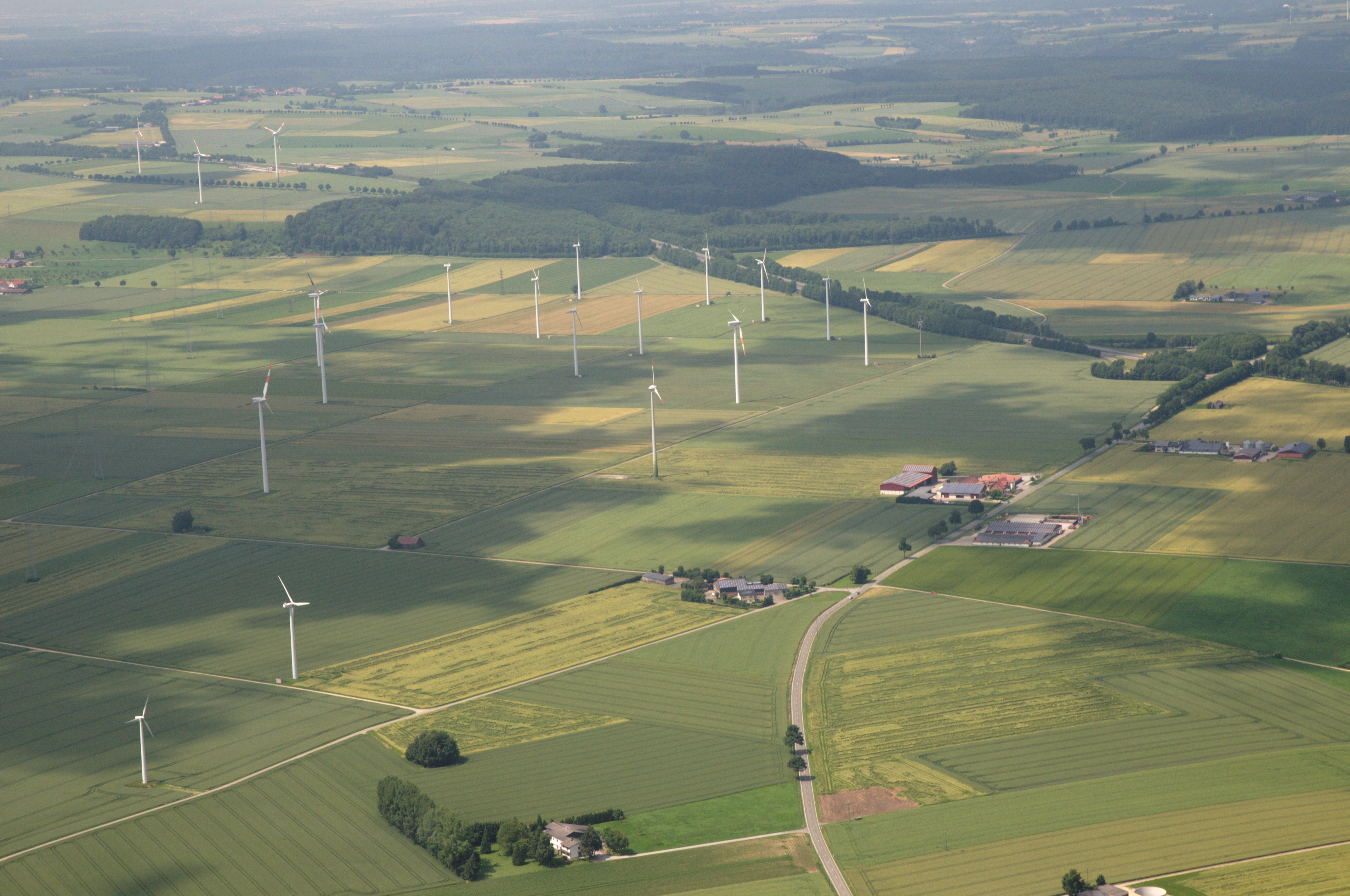 Fotoflug Sauerland-Ost: Höfe Theresenhof und Drei Linden, Windkraftanlagenpark Sintfeld westlich von Meerhof, L817, Bundesautobahn 44, Anschlussstelle Marsberg-Meerhof; Blickrichtung Nordwesten.